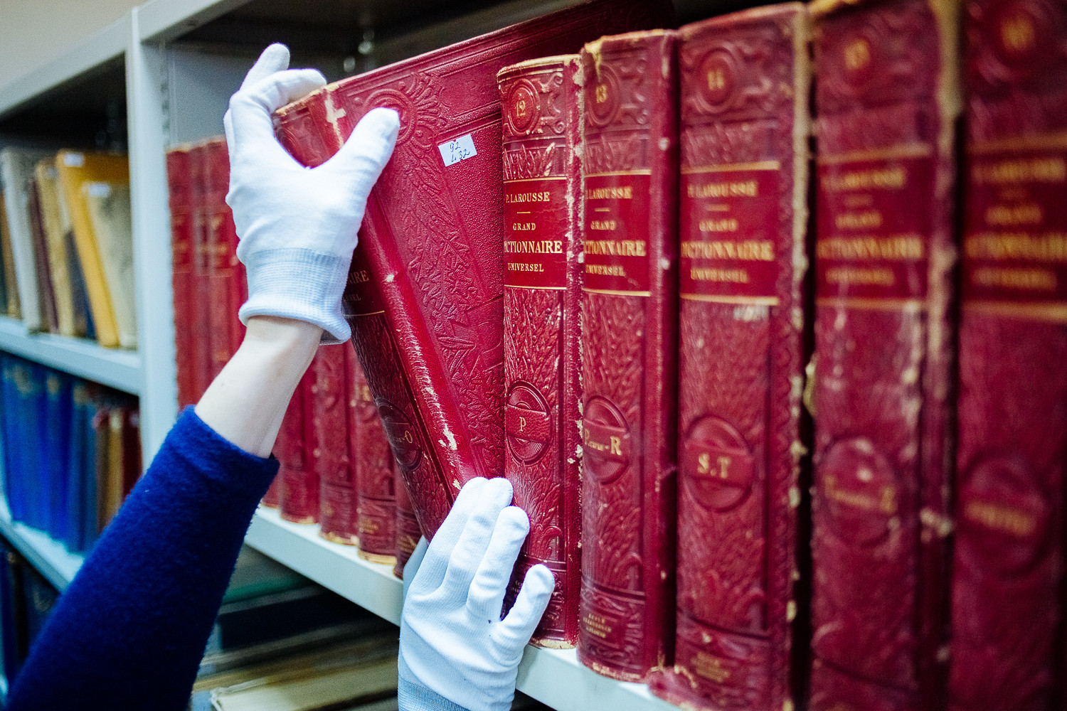 Государственное бюджетное учреждение культуры г. Москвы «Центральная универсальная научная библиотека имени Н.А. Некрасова» Главное здание Библиотеки им. Н.А. Некрасова 105005, Москва, ул. Бауманская, д. 58/25, стр. 14 (м. «Бауманская»)